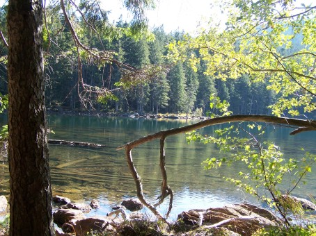 Černé jezero, jezerní stěna, východní břeh